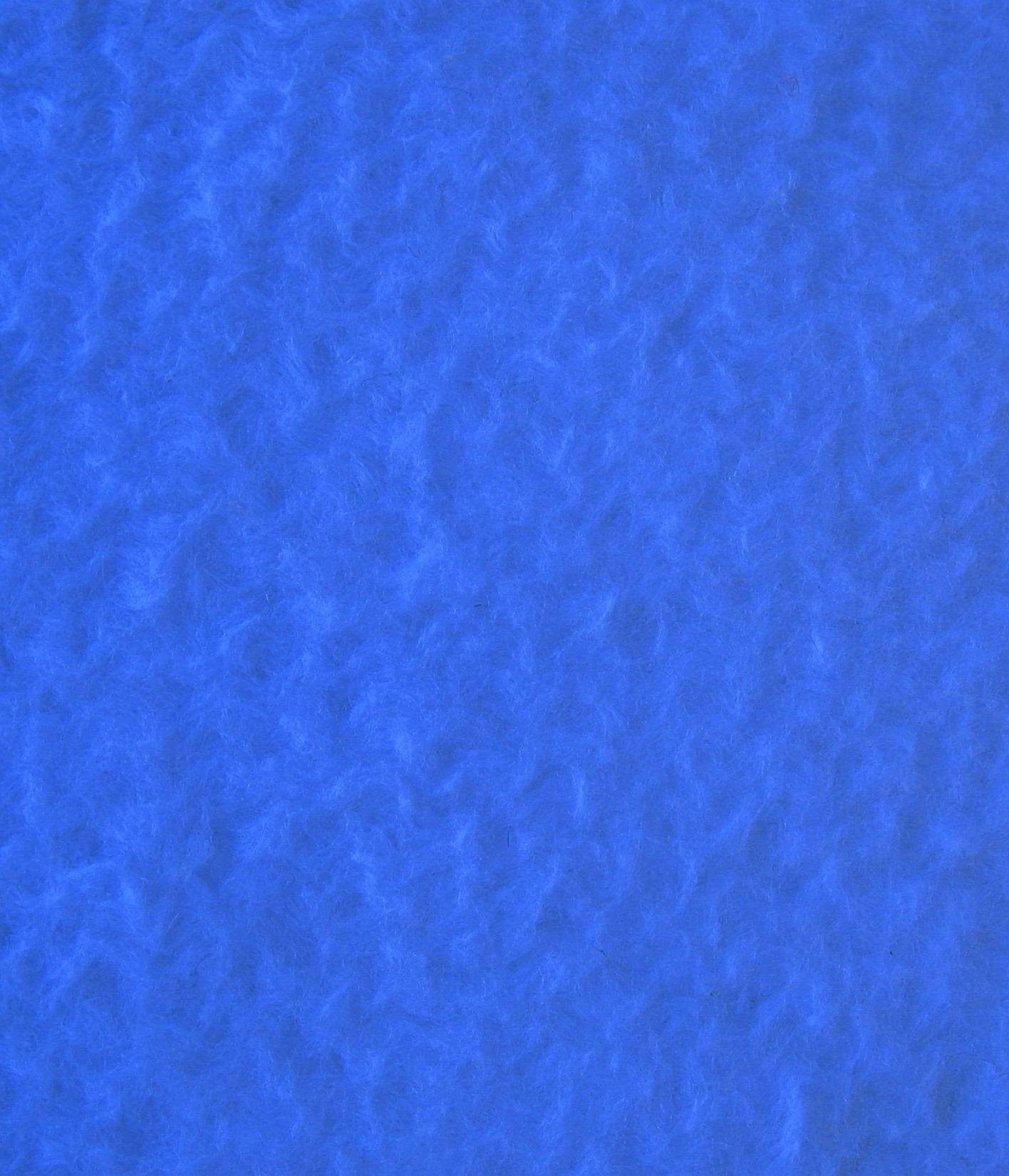 Molton - Gewebestruktur